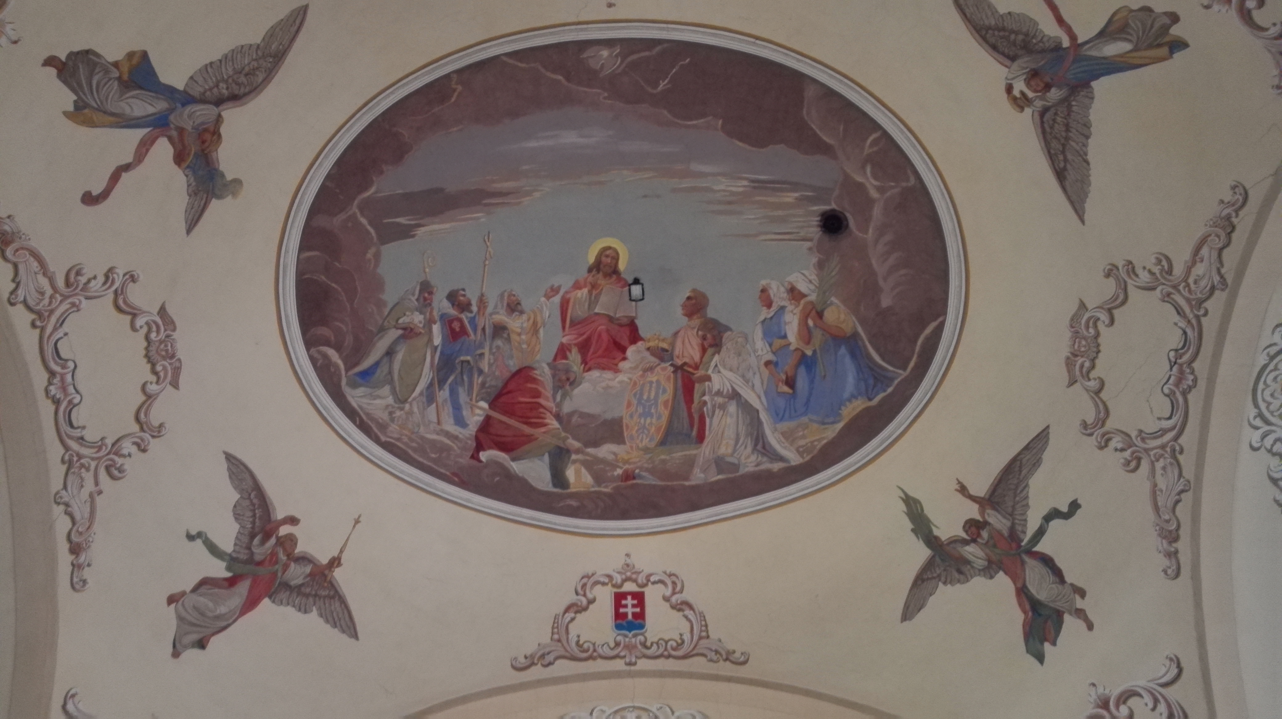 Najstaršia zachovalá maľba kostola, ktorú namaľoval známy slovenský maliar Jozef Hanula so svojími žiakmi na objednávku krasňanského farára Mateja K. Burlasa za 270 tis. Kčs. Namaľoval ju v roku 1927. Je kysuckou kúlturnou pamiatkou. Na maľbe je namaľovaný v prostriedku maľby Ježiš Kristus, na ľavom boku sv. Bystrík, sv. Cyril a Metod, pod nimi sv. Vojtech, sv. Ján Nepomucký, nad ním sv. Václav a na pravom boku sv. Alžbeta a sv. Anežka.